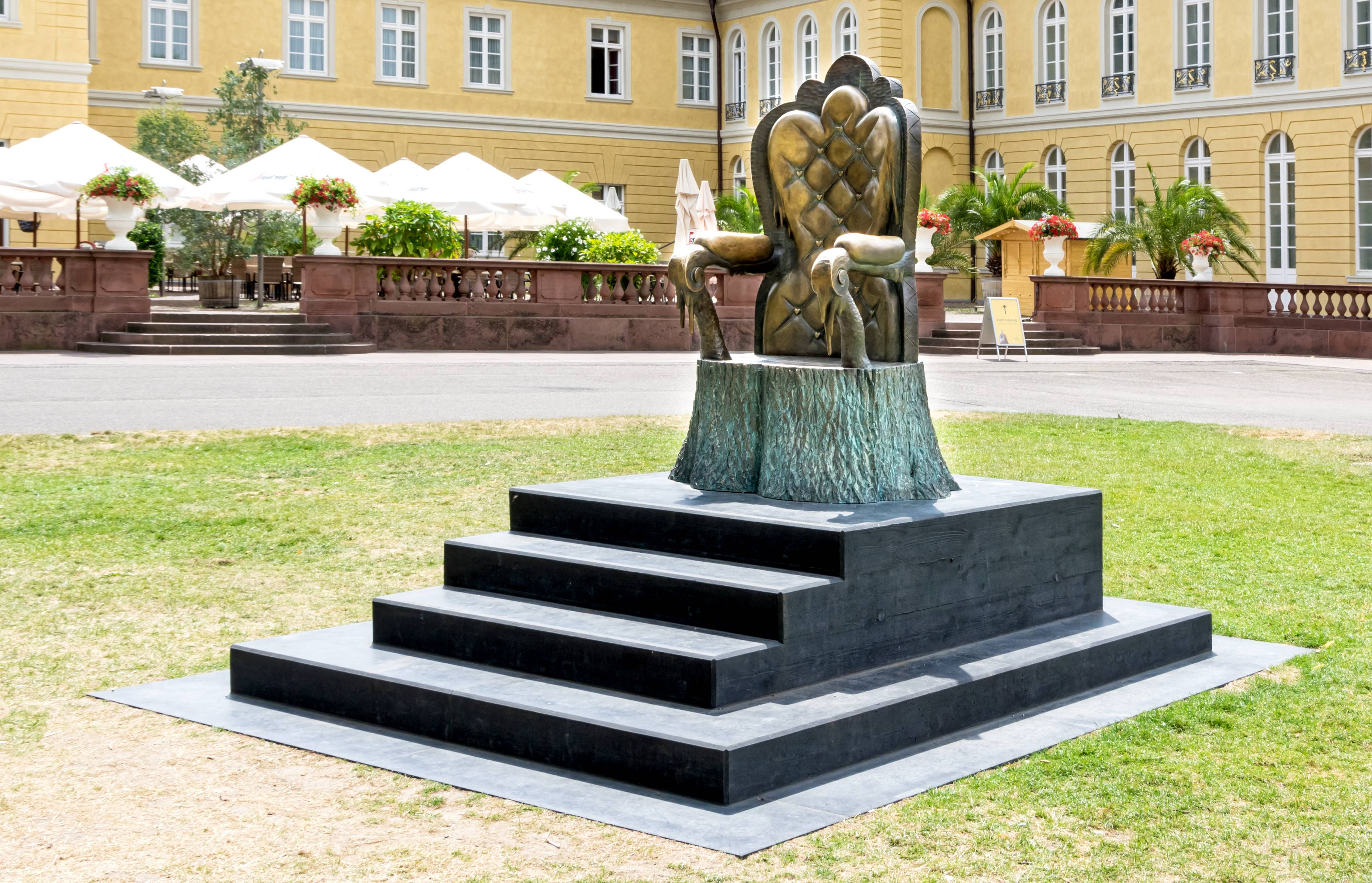 Die von Stefan Strumbel zum 300. Stadtgeburtstag von Karlsruhe gefertigte Bronzeplastik. Der Stuhl wurde vom Hause Baden beauftragt. Er ist am 17. Juni 2015 enthüllt worden.